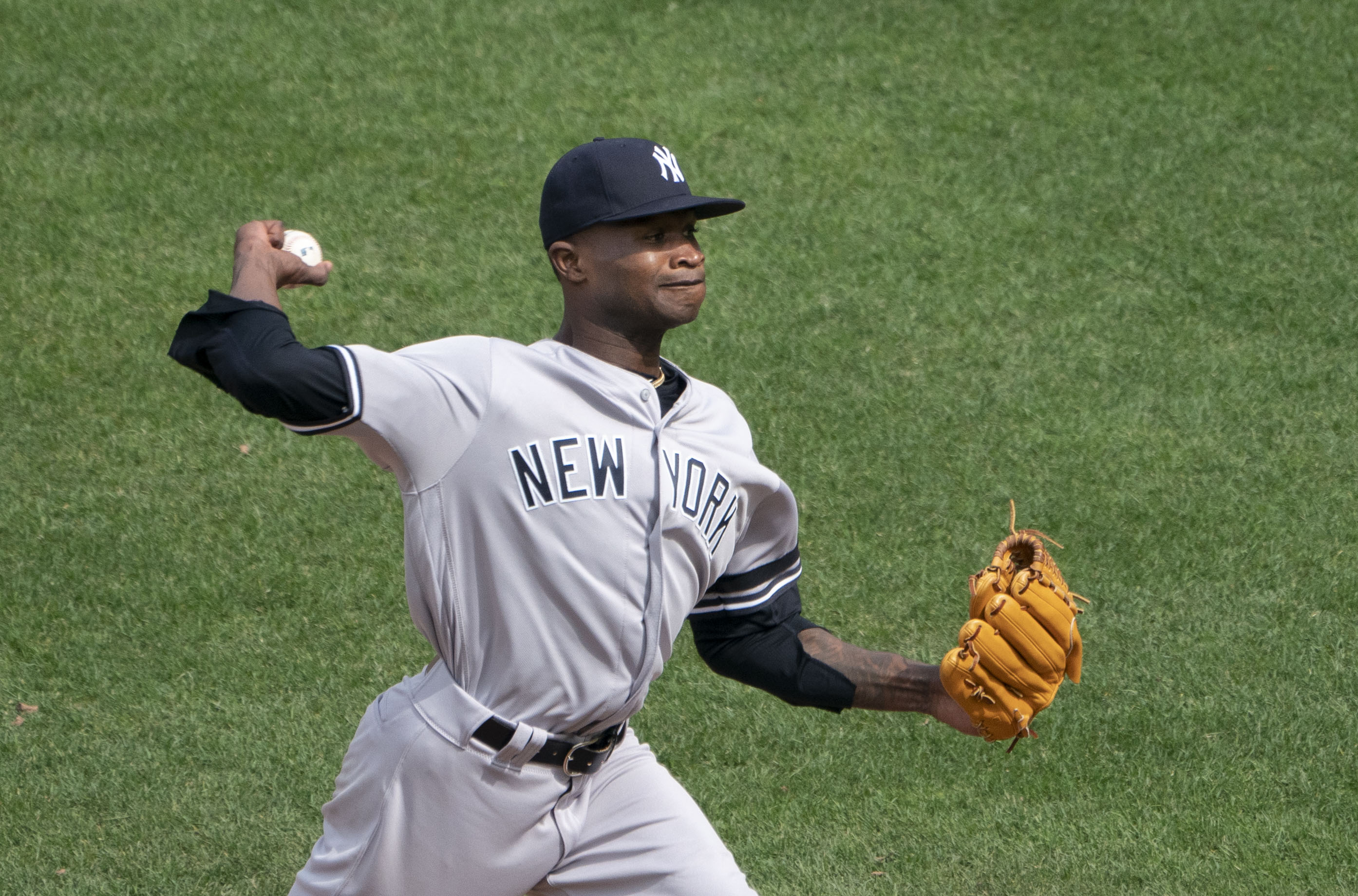 Yankees at Orioles 4/7/19